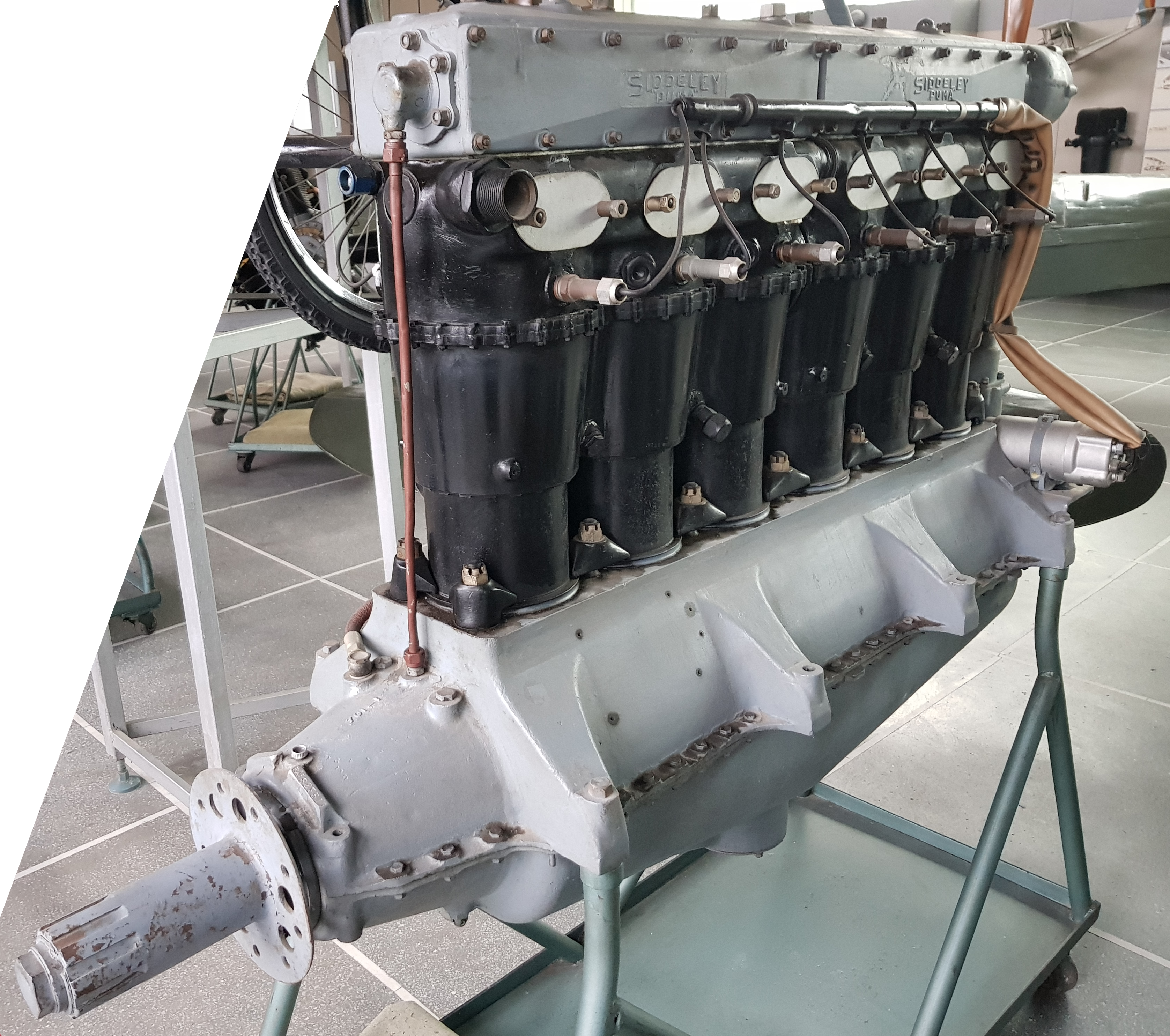 Siddeley Puma-Flugzeugmotor. Hergestellt 1917/8, im Militärmuseum Bukarest.